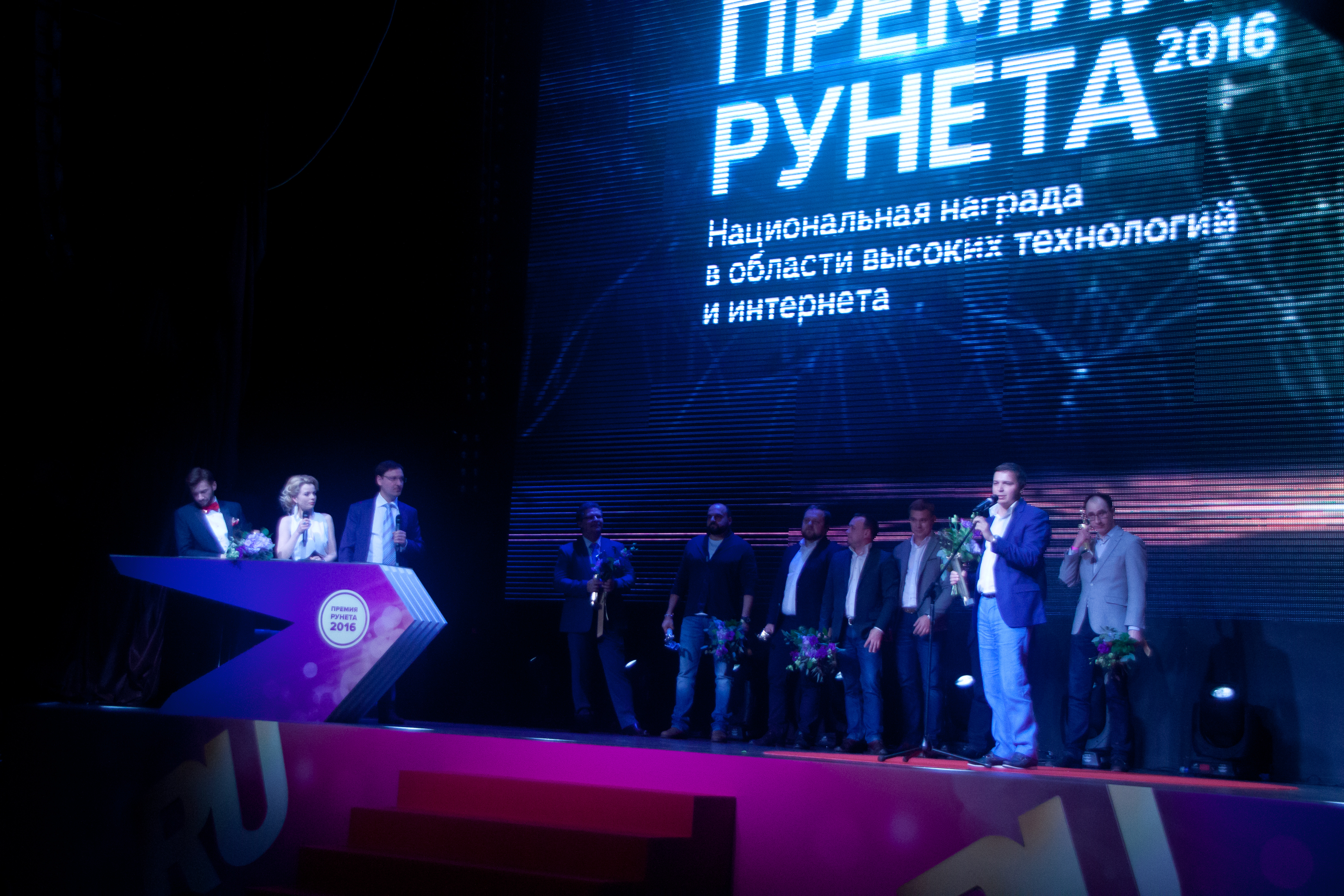 Церемония вручения Премии Рунета в Известия Холл, 2016